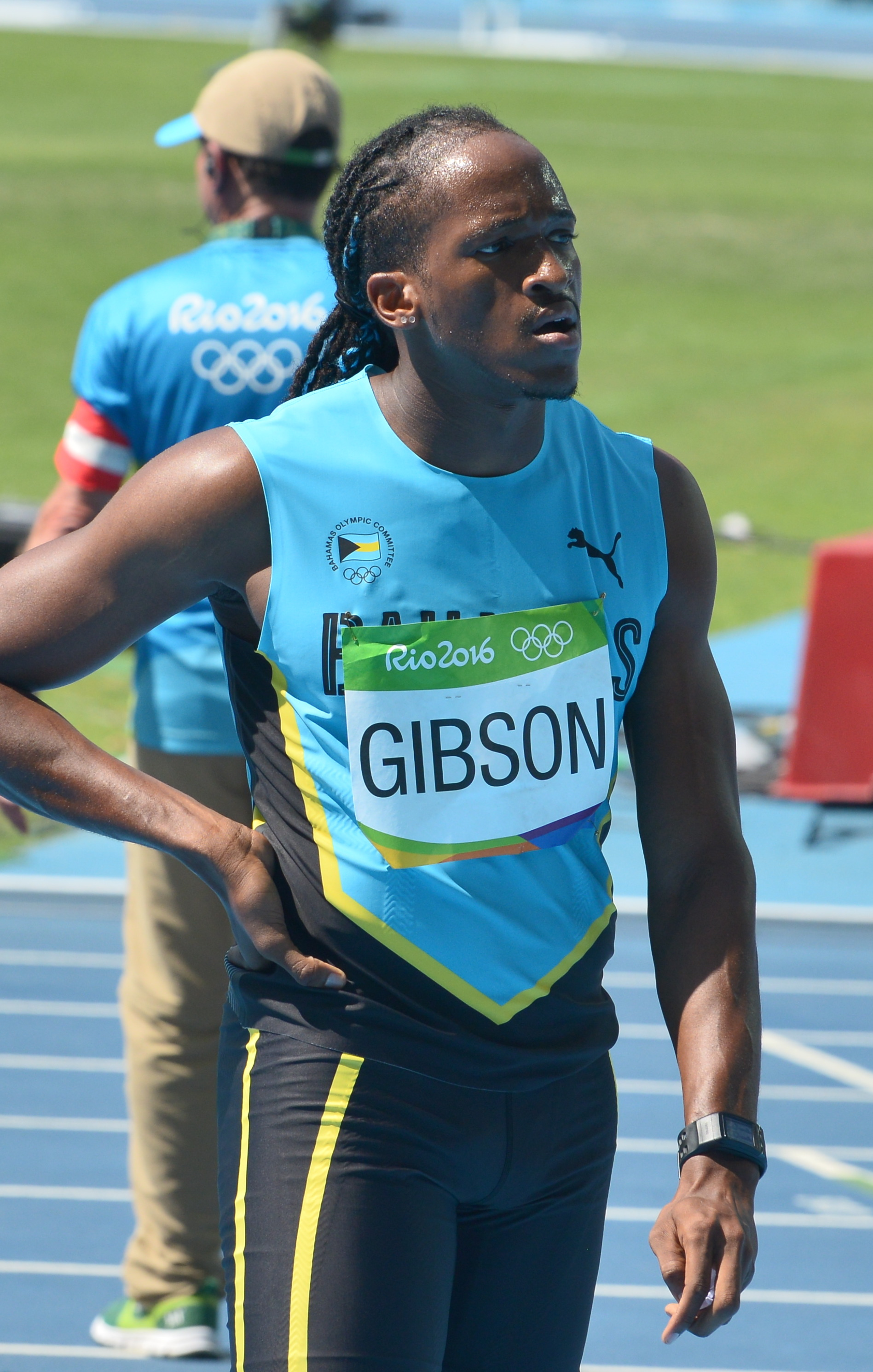 Quelques séries du 400m haies des jo de Rio 2016